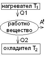 Схема на топлинна машина